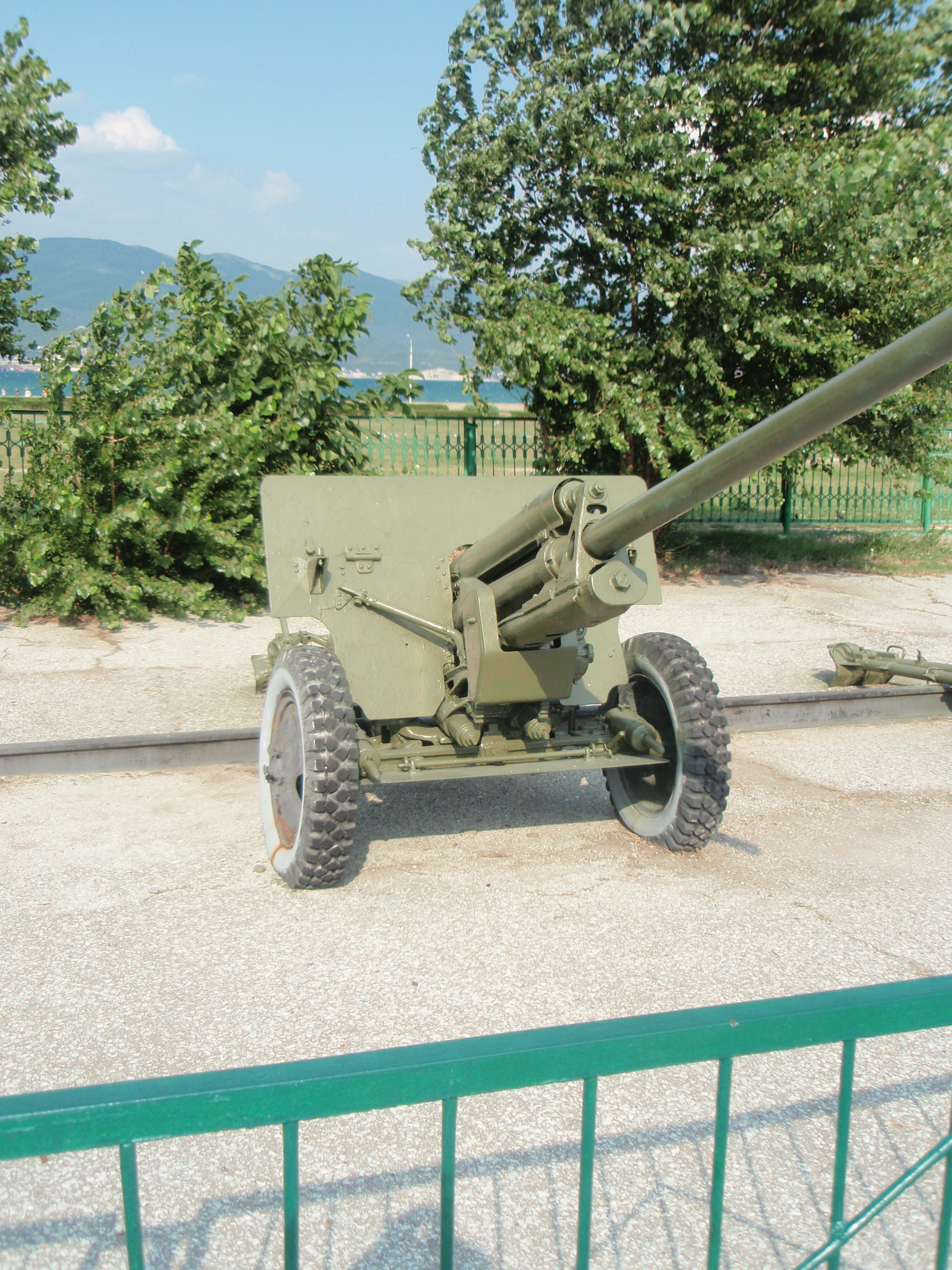 Советская 57-мм противотанковая пушка ЗИС-2 обр. 1943 г. в музее-заповеднике «Малая земля» (г. Новороссийск)